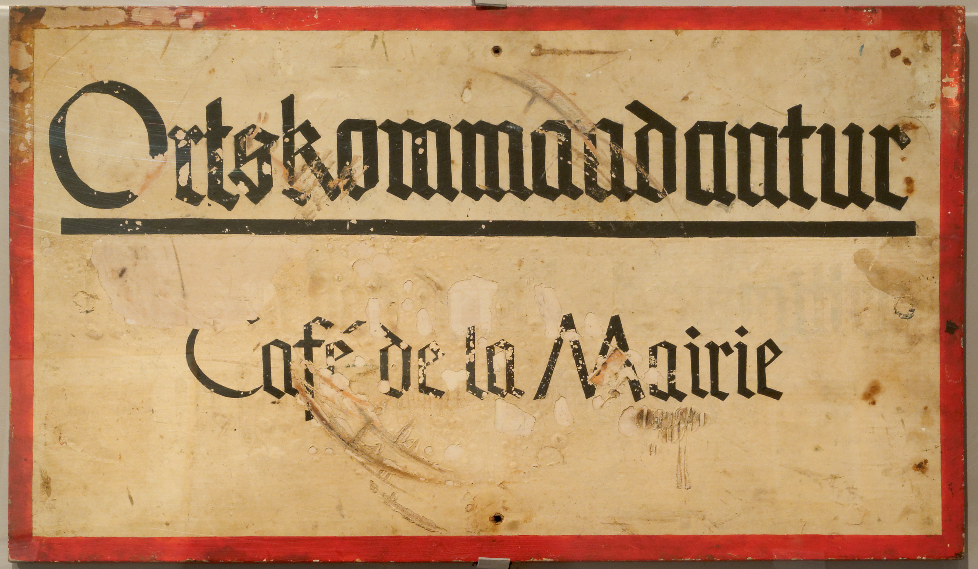 Musée d'Histoire de Belfort : Plaque de la Kommandantur de Belfort. Métal et peinture émaillée. Collection Musées de Belfort.